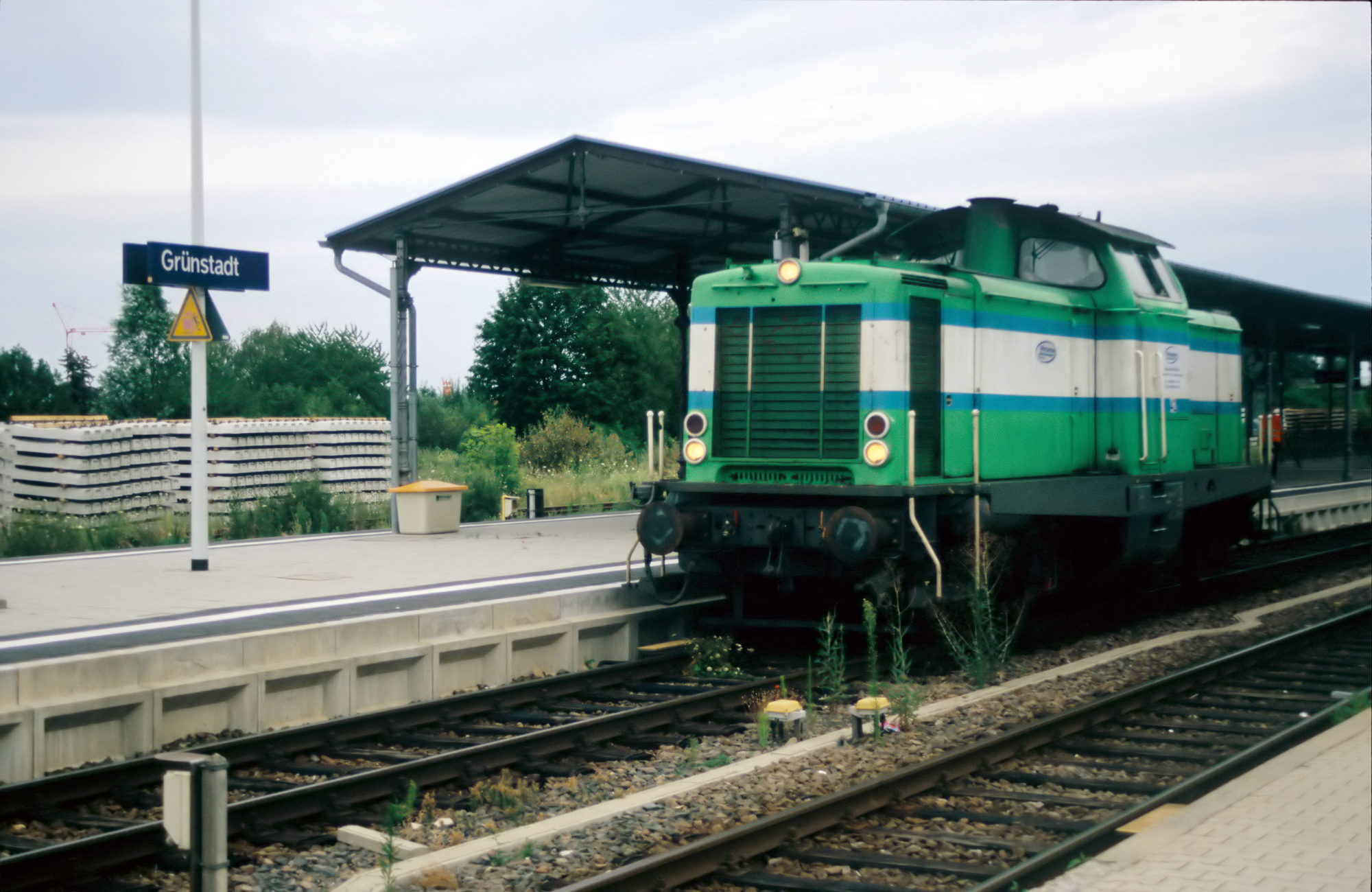 Lok 42 der Rhenus Rail St. Ingbert GmbH im Grünstadter Bahnhof, Locomotive 42 of the Rhenus Rail St. Ingbert GmbH in the Grünstadt station, Locomotive 42 des Rhenus Rail St. Ingbert GmbH dans la gare de Grünstadt (Camera = Canon EOS 500, Film = Sensia 100)